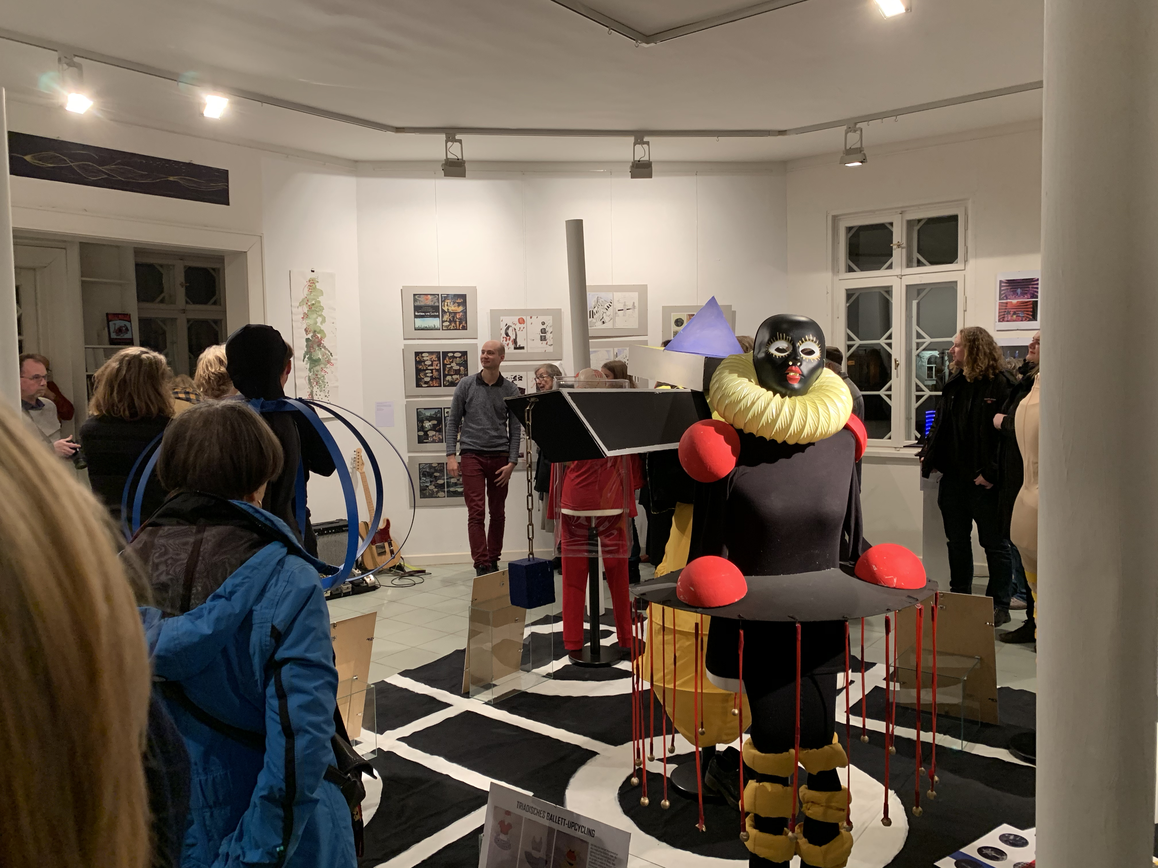 Ausstellung der Fachbereiche Illustration und Bühnenbild im Roten Pavillon, Bad Doberan